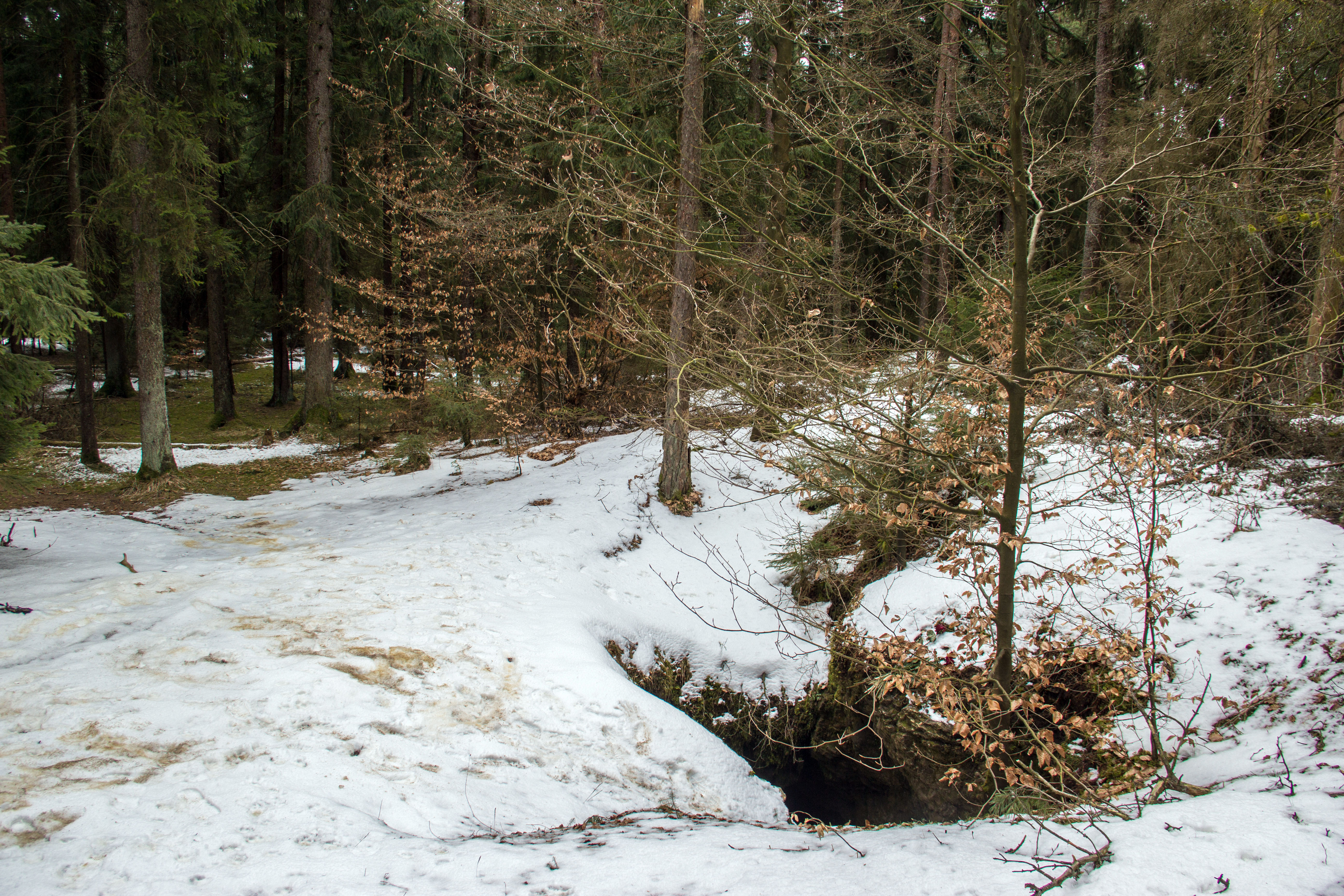 Alfeld, Windloch, E 11